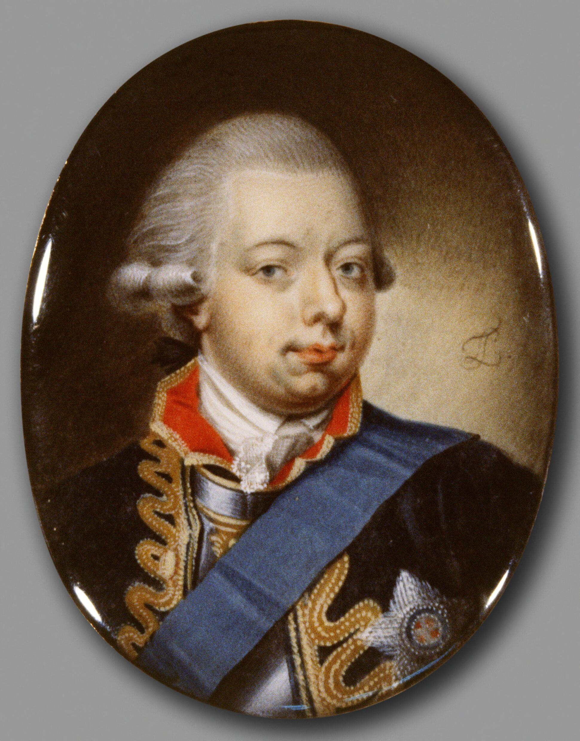 Portret van Willem V van Oranje-Nassau (miniatuur)